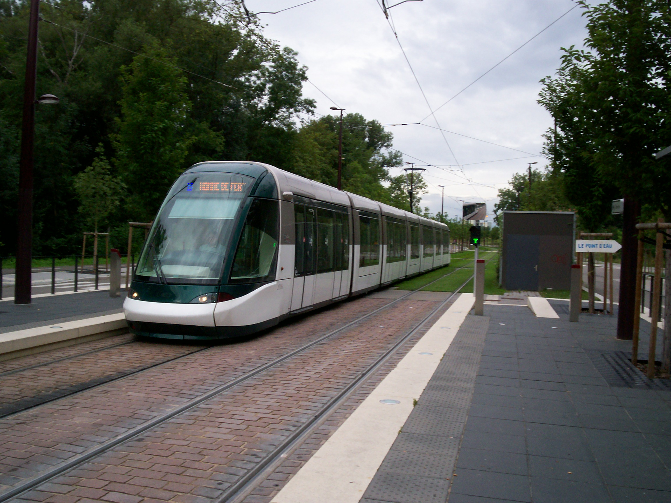 Tramway de Strasbourg line B à Ostwald Hôtel de Ville, vers Homme de Fer